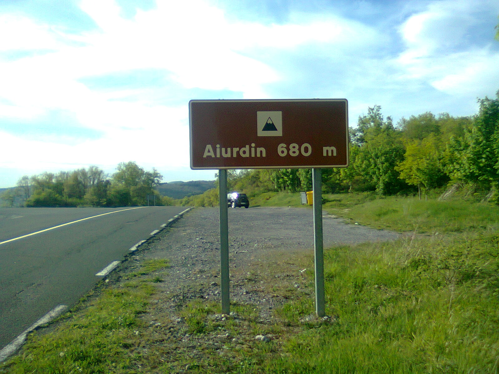 Puerto de Aiurdin (Álava, España).